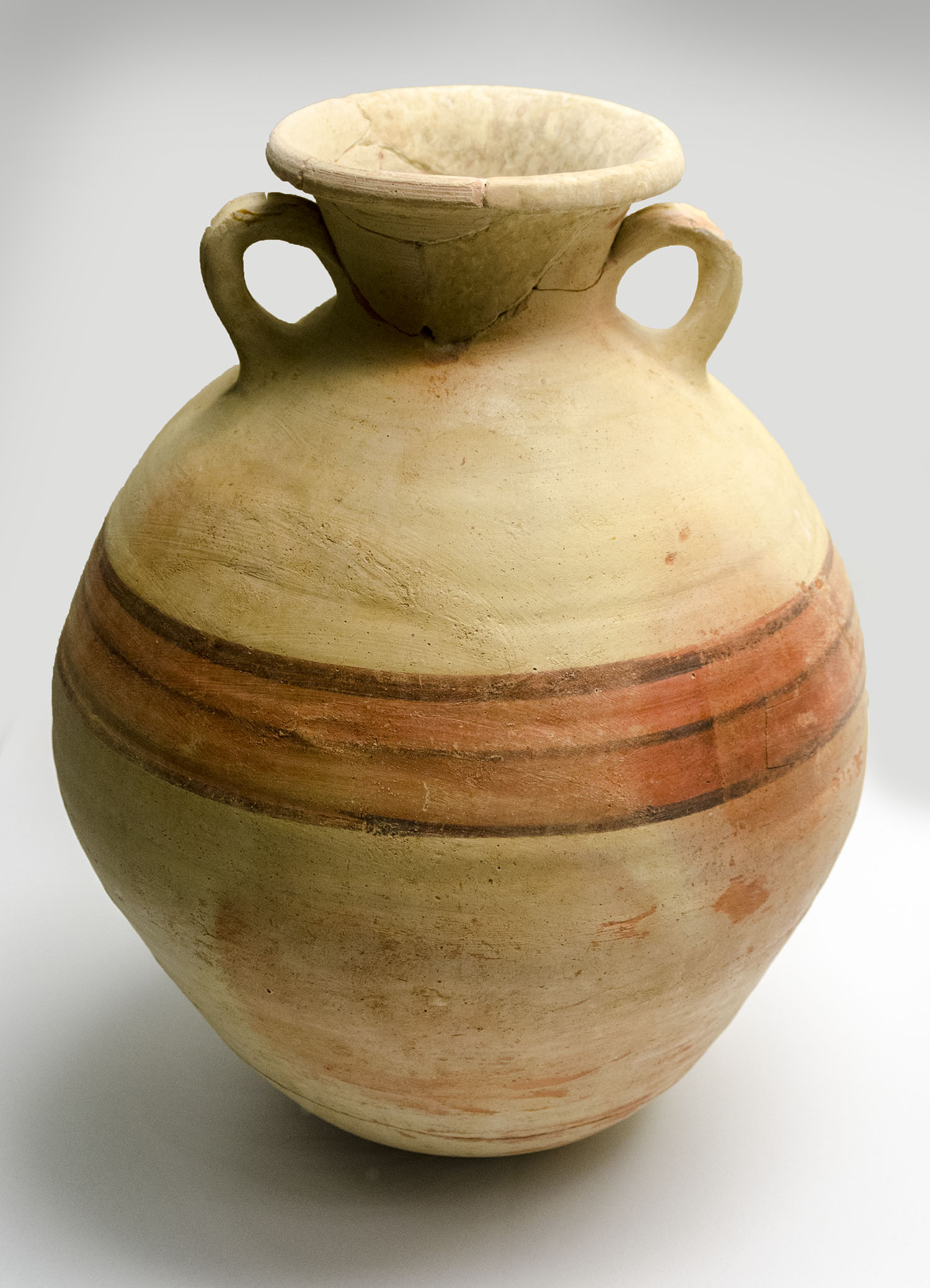 Datada en el siglo VI a.C. y encontrada en la actual calle Tolosa Latour de Cádiz.